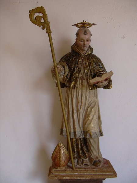 San Martin de Finojosa